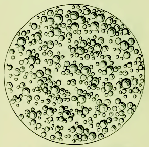 Fig. 34. Vollmilch mit ihren Fettkügelchen.